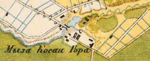 План мызы Косая Гора. 1885 г.